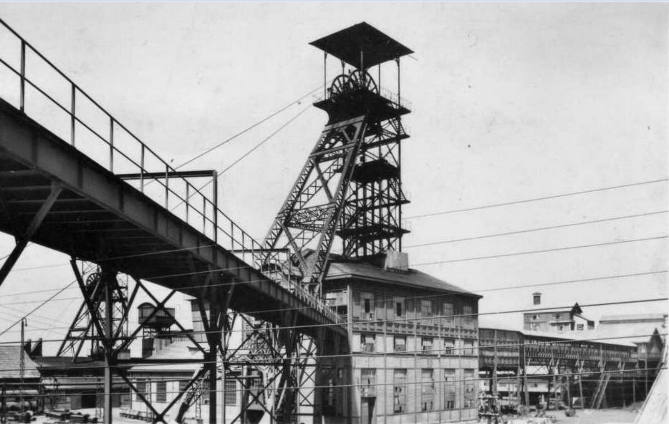 Fosse n° 5 - 5 bis de la Compagnie des mines de Liévin, Liévin, Pas-de-Calais, Nord-Pas-de-Calais, France.